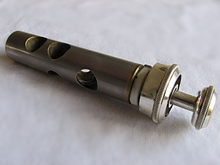 Eigen foto van eigen instrument